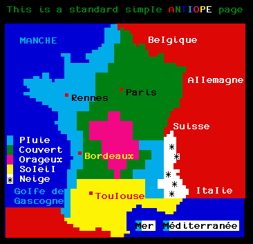 Image Vidéotex de type Ceefax